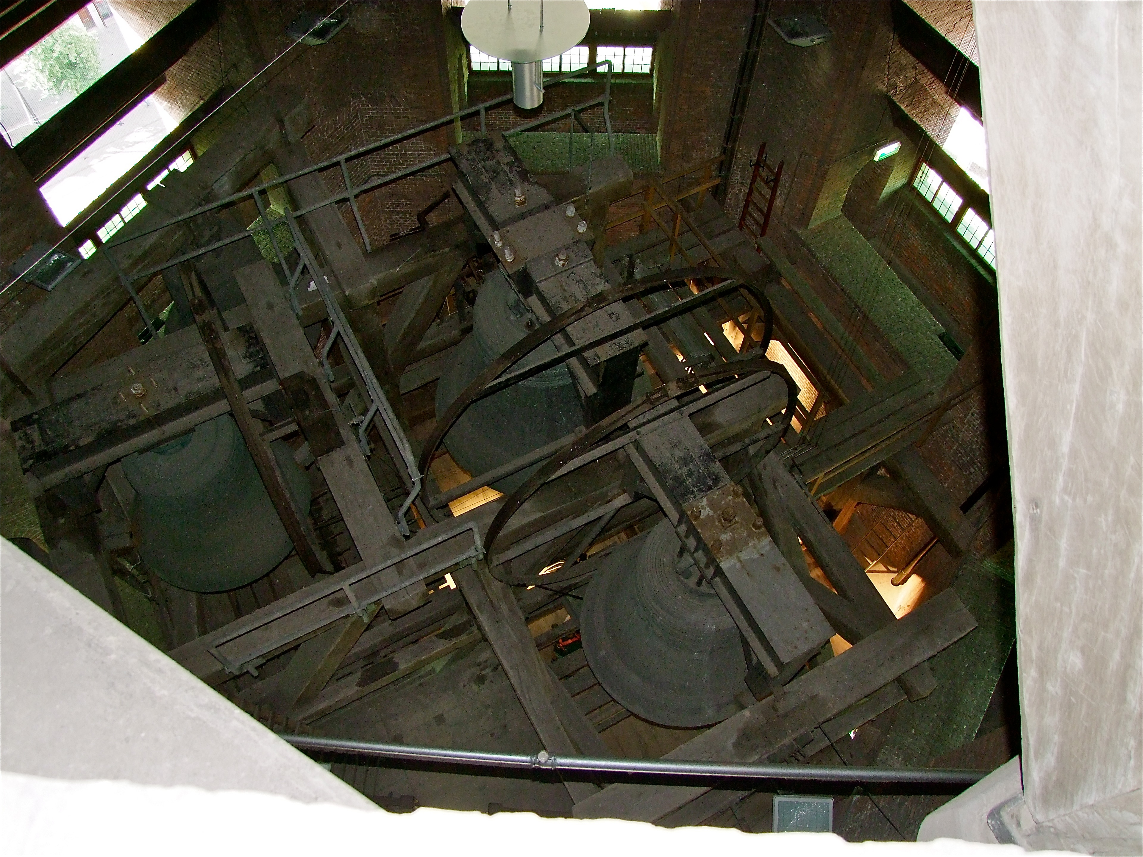 De toren brandde in 1539 voor het eerst gedeeltelijk af door blikseminslag. Karel V droeg bij aan de herbouw en de bijna 6000 kilo wegende grote luiklok, de zgn "Jhesusklok". Hierop is het eerst bekende voorbeeld van de Haagse ooievaar te zien. Deze werd gegoten door Jan en Jasper Moer in 's-Hertogenbosch in 1541. In 1542 was de wederopbouw voltooid. De afgebrande houten gotische spits was vervangen door een renaissancistische. In 1665 schreef Constantijn Huygens dat hij vanaf de toren de zeeslag kon zien die het begin werd van de Tweede Engels-Nederlandse Oorlog. In 1702 sloeg de bliksem nogmaals in. Ditmaal heeft de burger Abraham Streng de brandende toren, 321 treden, beklommen om het vuur te doven met zijn nachthemd. De spits is in 1861 vervangen voor een veel zwaardere gietijzeren neogotische, die in de volksmond al snel de "slaapmuts" werd genoemd. Door het gewicht van deze spits begonnen de zware bakstenen muren van de toren al snel scheuren te vertonen. In 1957 werd de met koper beklede houten renaissancistische spits gereconstrueerd, zij het wat groter om het inmiddels uitgebreide carillon te herbergen. Bij deze restauratie werden ook betonnen tussenverdiepingen gemaakt die de wanden weer in verband trokken. De grootste 4 klokken hangen op de luidzolder, een paar etages onder de spits. Dit zijn Jhezus (1541), Salvator (1547), Jacob (1570), Wegewaert (1647). De Maria uit 1543 is al in 1575 tot kanonnen omgesmolten.8377 info